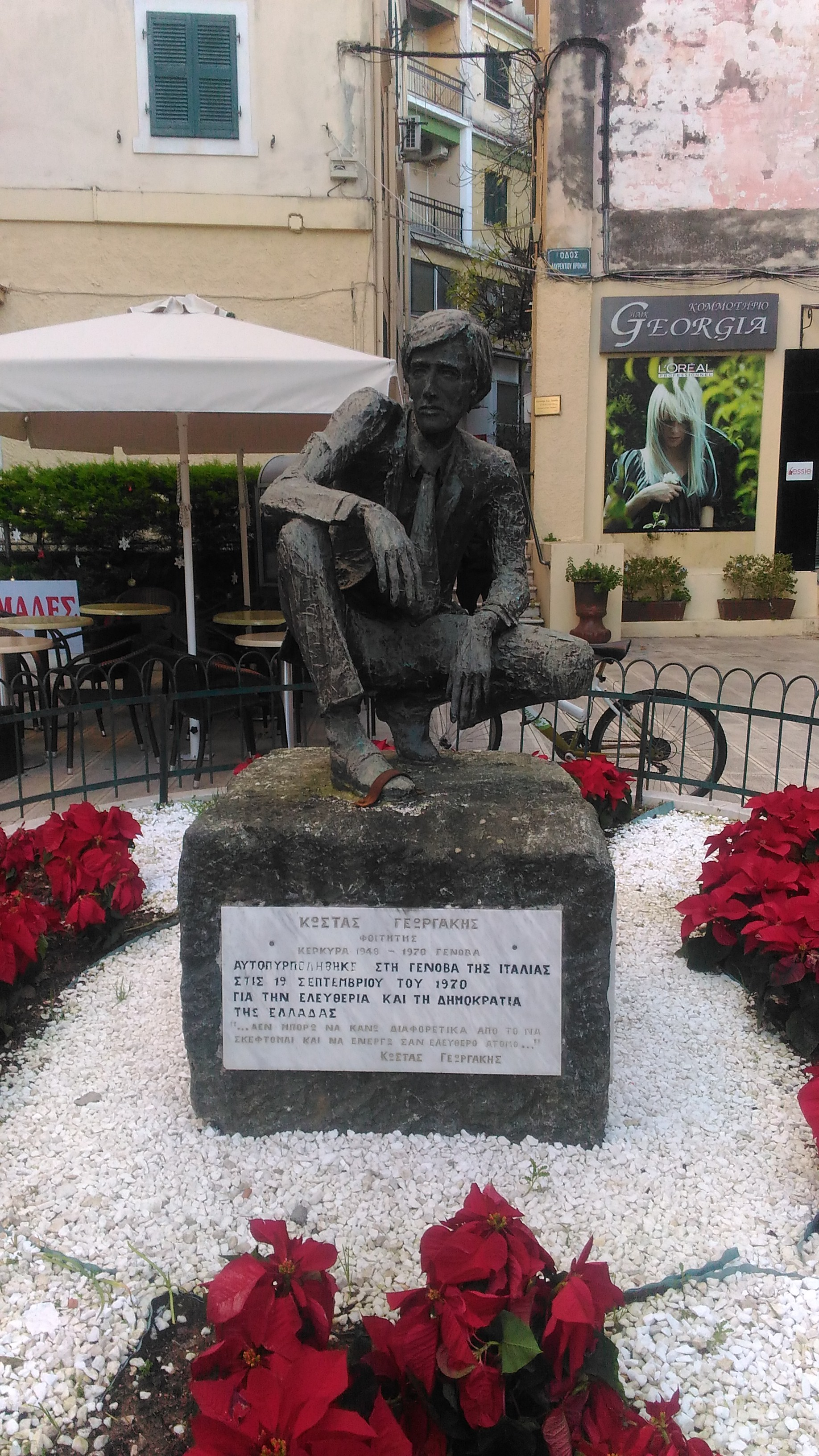 Statue de Kostas Georgakis.